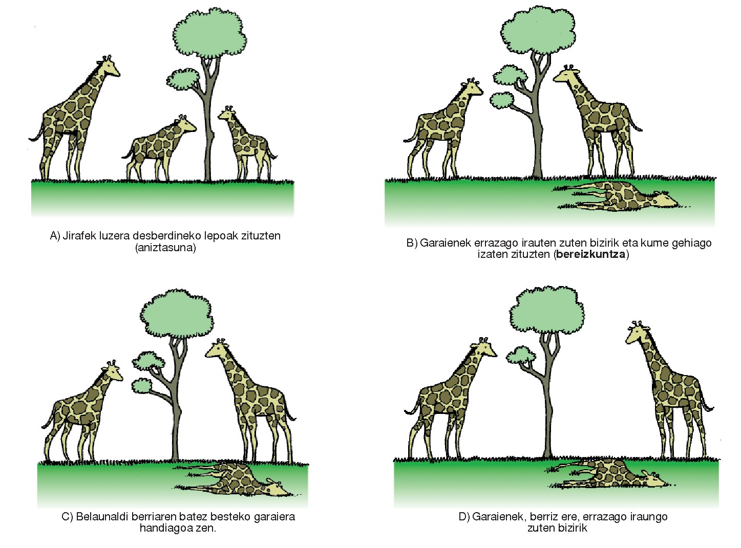 Jirafaren eboluzioa Darwinen arabera.